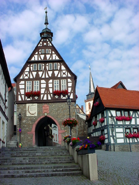 Das historische Rathaus in Oberursel